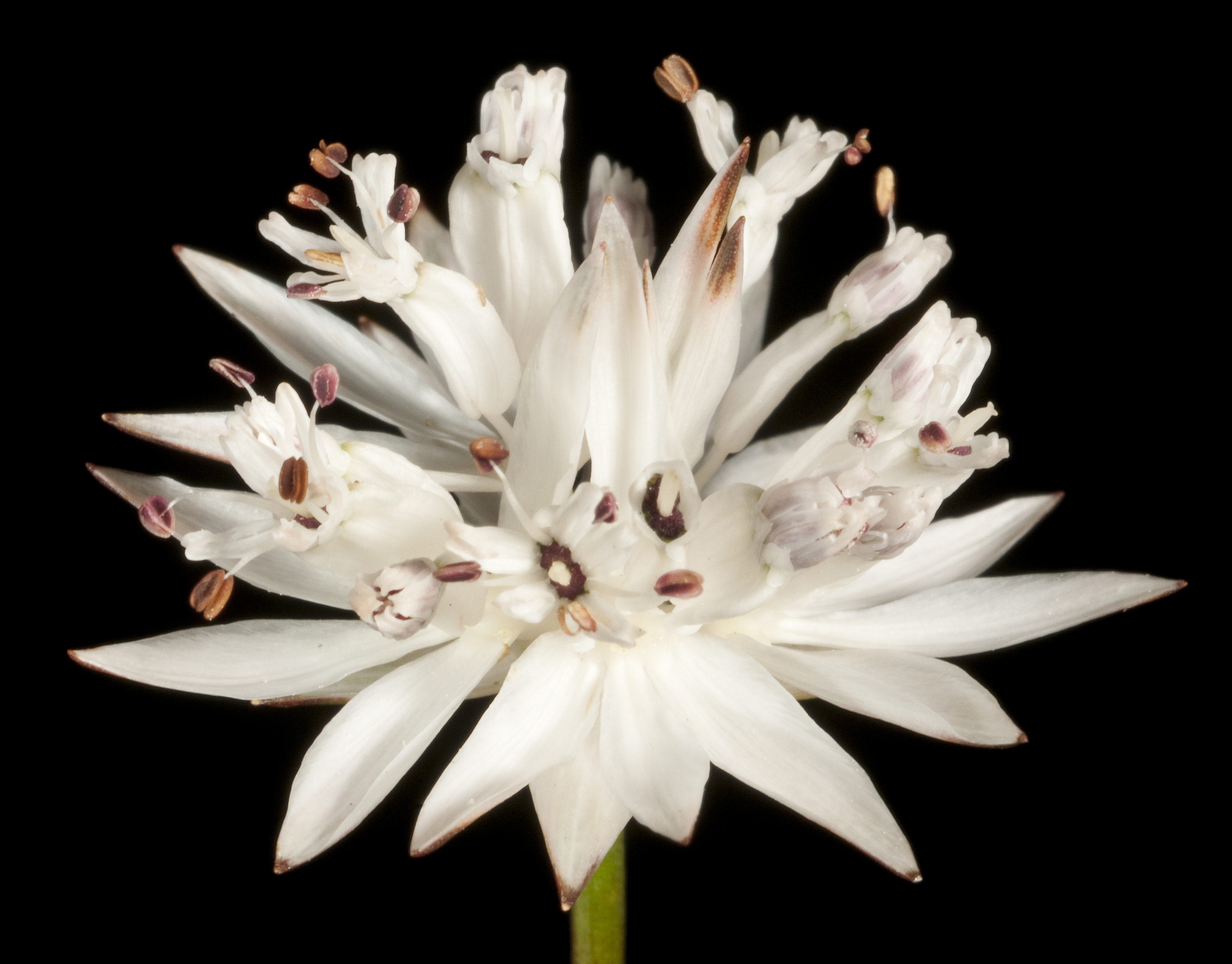 G Paczkowska 23 Western Australian Herbarium